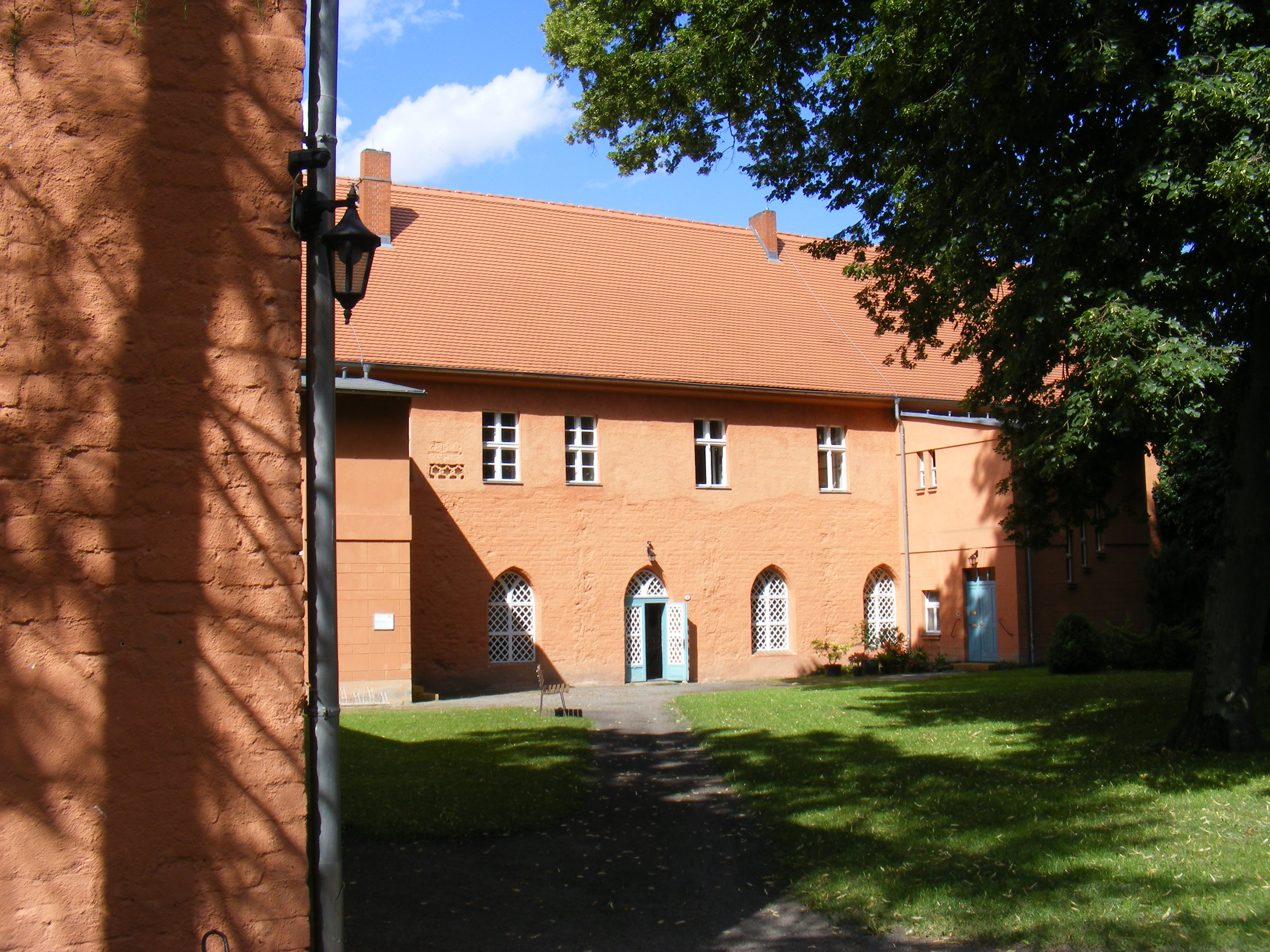 Kloster Zehdenick, Blick auf den Nordflügel mit Kreuzgang